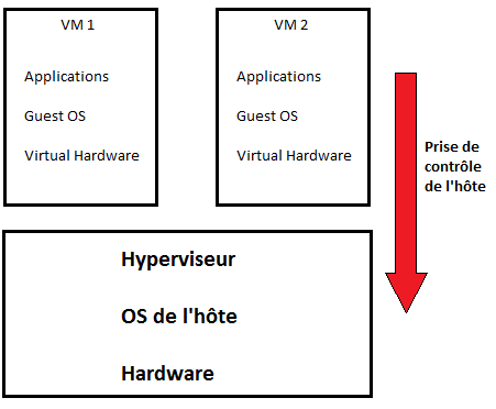 Environnement virtuel, prise de contrôle de l'hôte